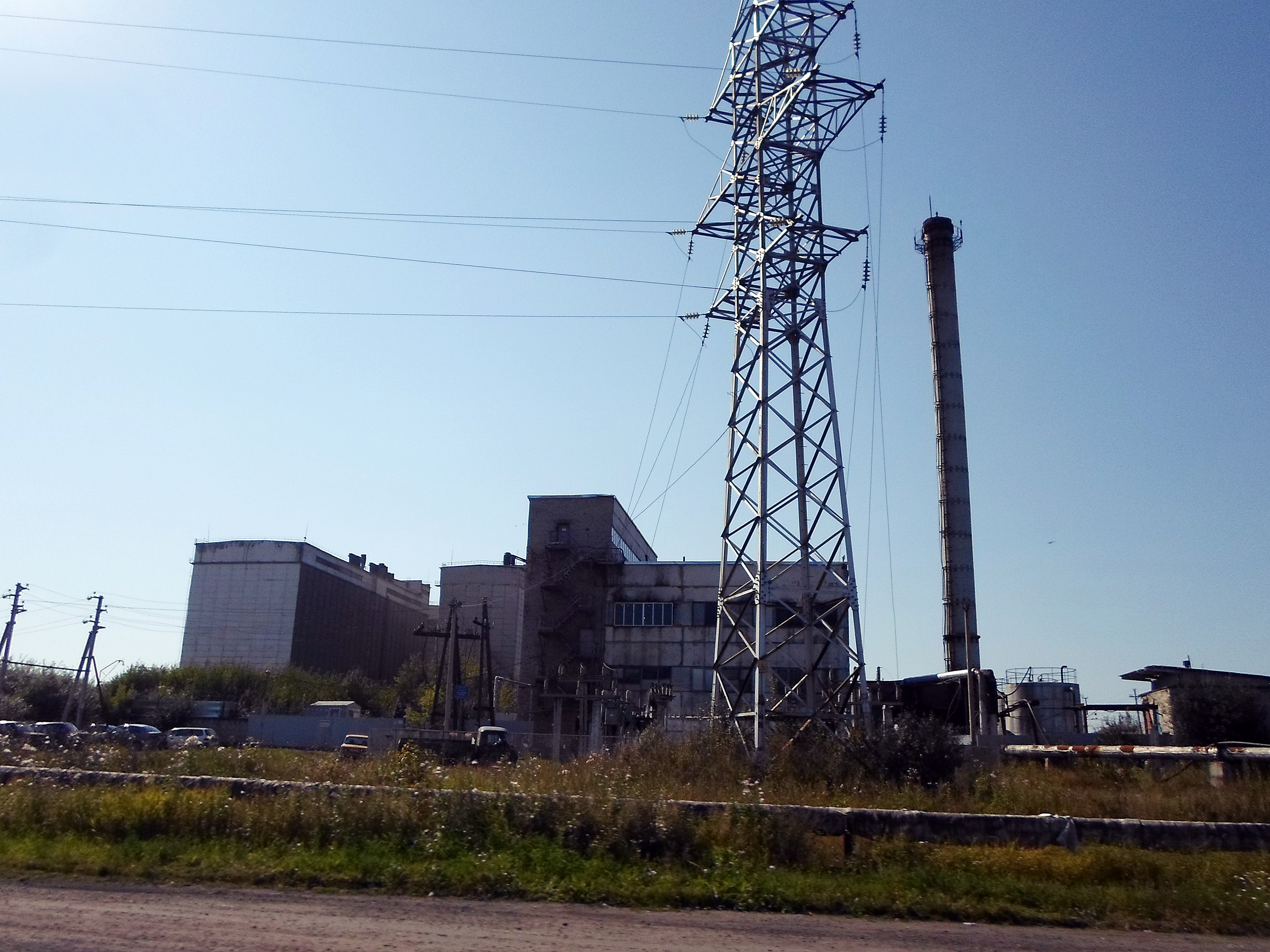 Элеватор в городе Заозёрный, Красноярский край.